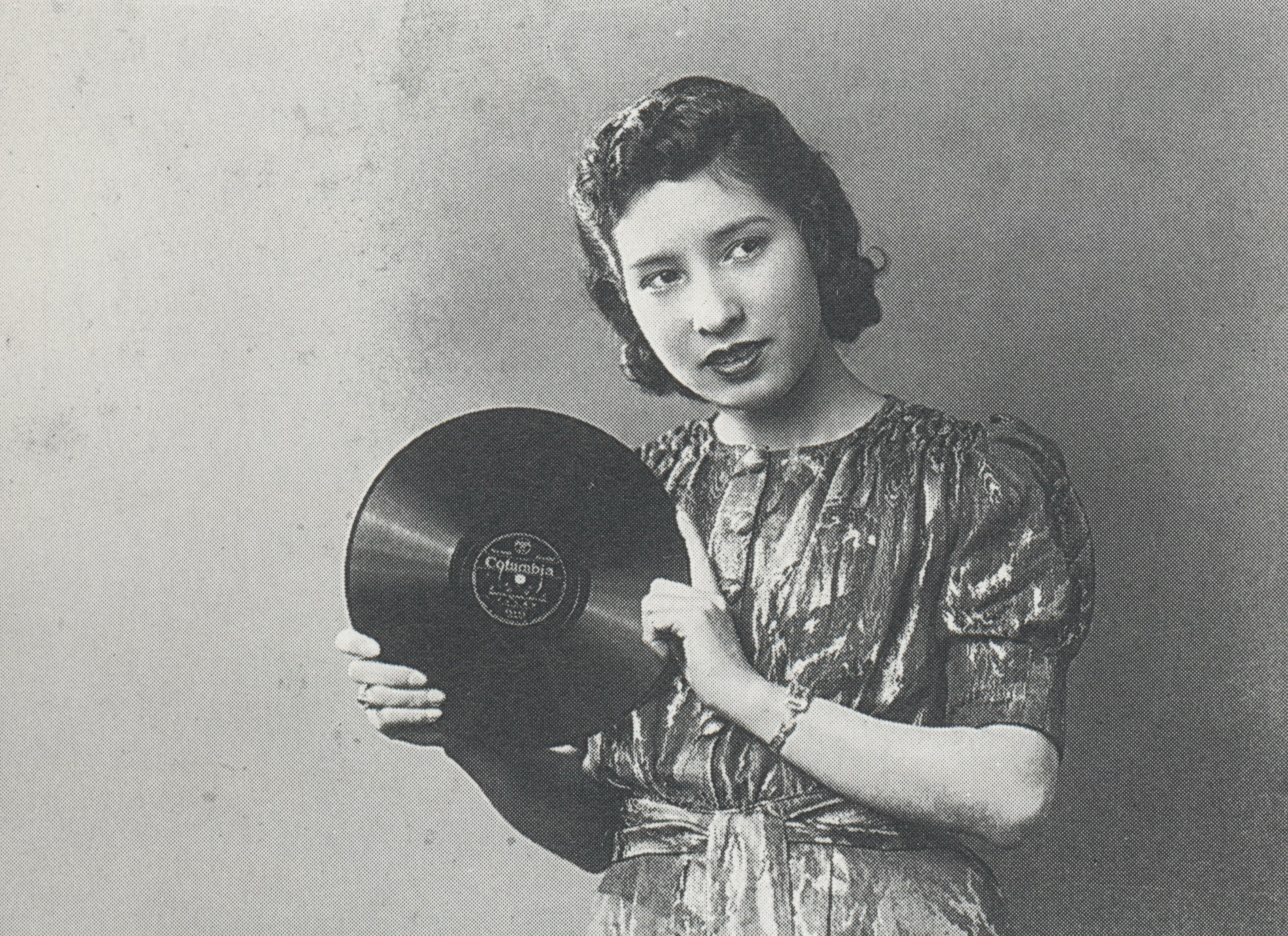 1938年に発売された「支那の夜」宣伝用スチールをスキャナでスキャン